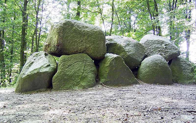 Hünengrab bei Reinfeld (Holstein) Sprockhoff 286